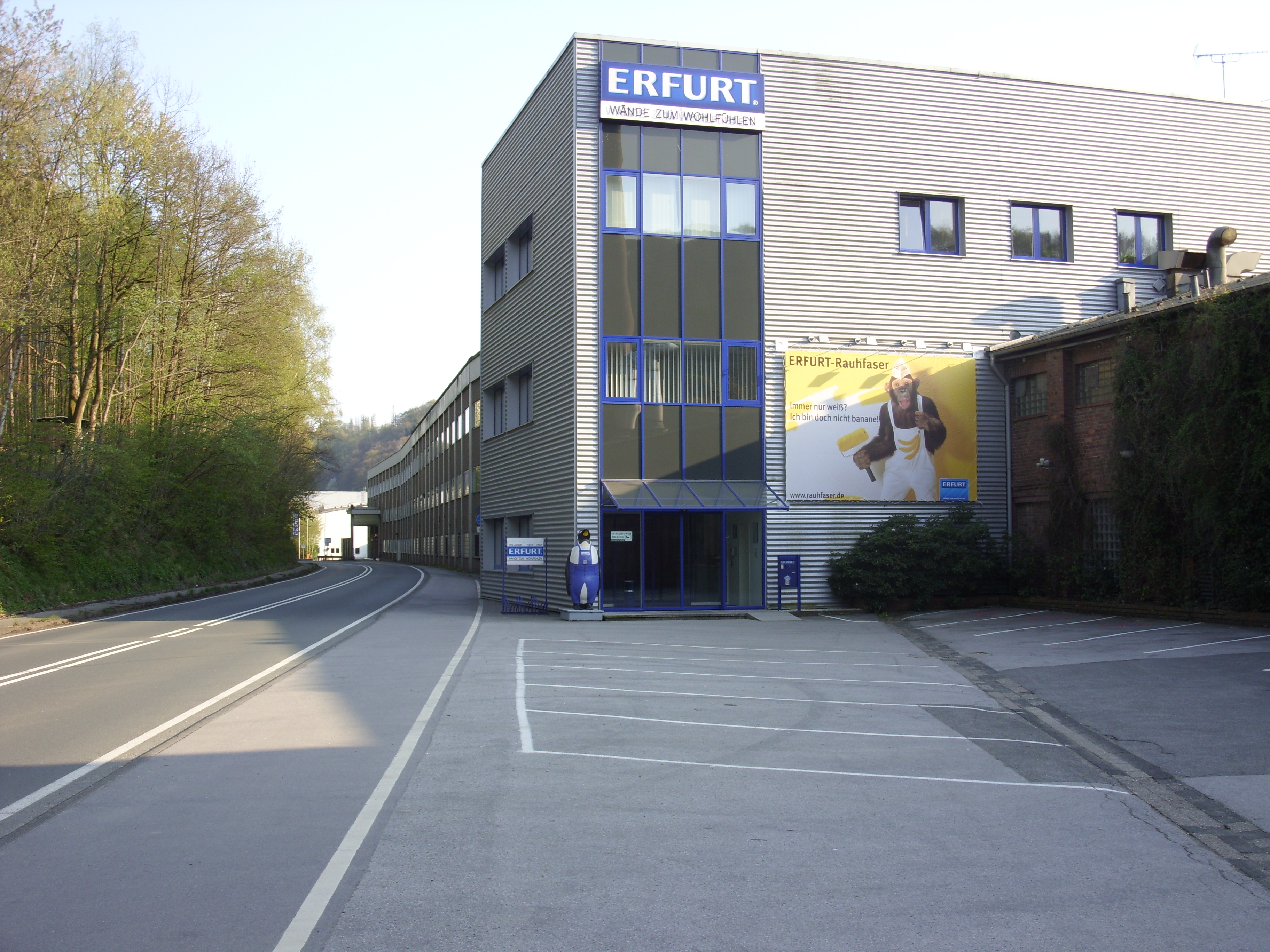 Gebäude des Unternehmens Erfurt & Sohn an der Wupperstraße in Schwelm, Ennepe-Ruhr-Kreis, Nordrhein-Westfalen